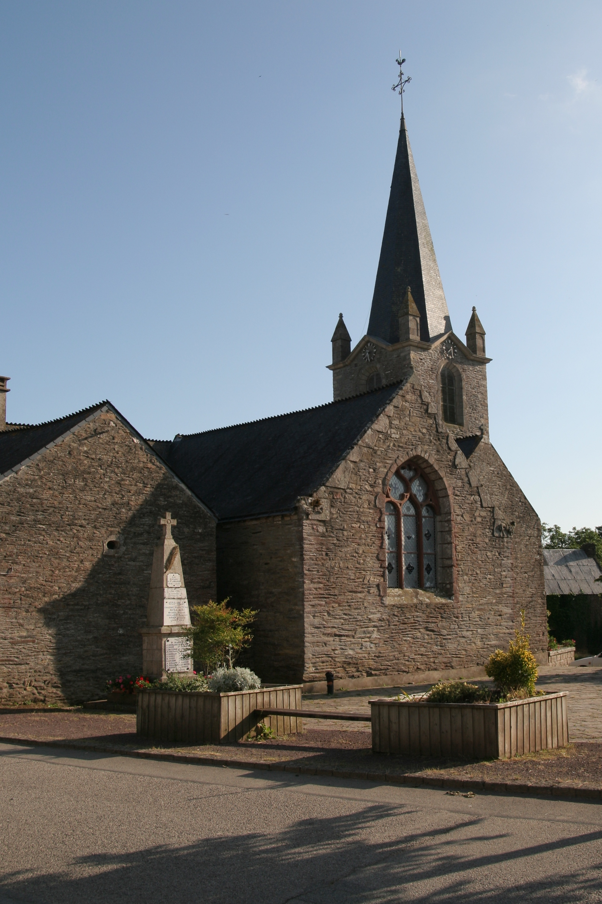 Église Saint-Étienne de Saint-Abraham.